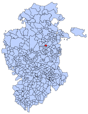 Reinoso de Bureba en Burgos